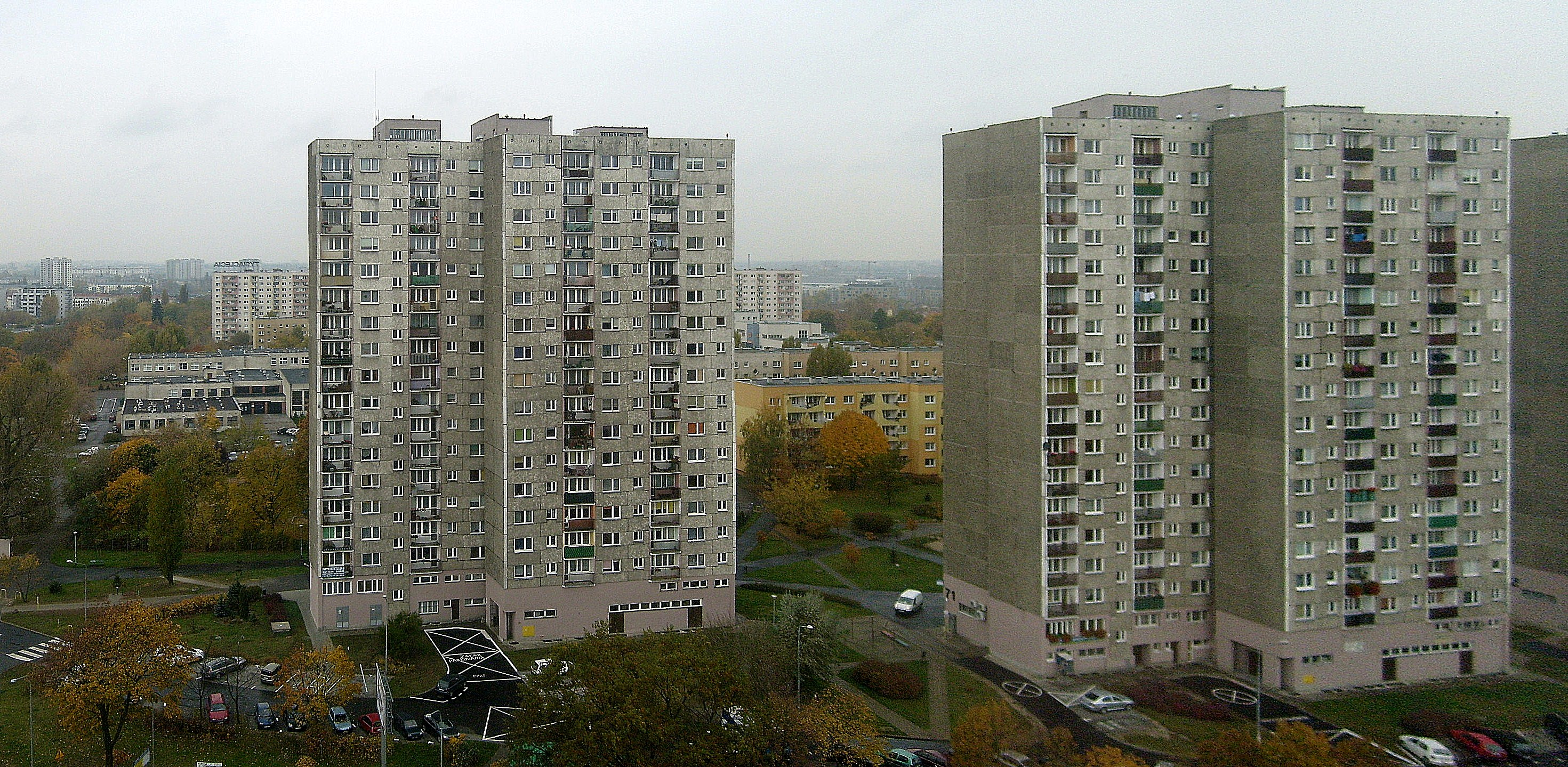 Osiedle Tysiąclecia (Poznań) - wieżowce 70, 71, w tle szkoła i niskie bloki